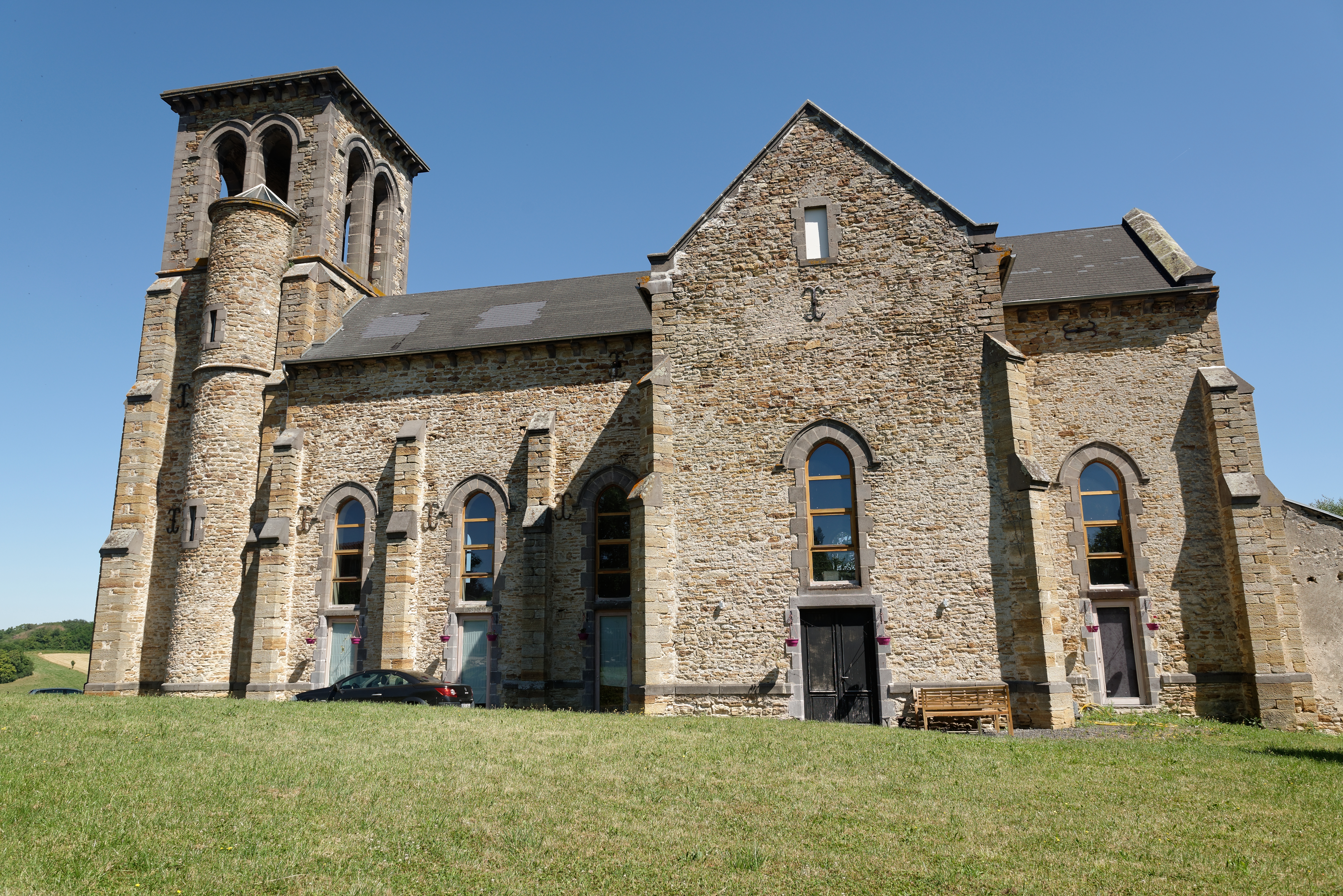 Église déconsacrée de La Martre à Montmorin, Puy-de-Dôme, France.